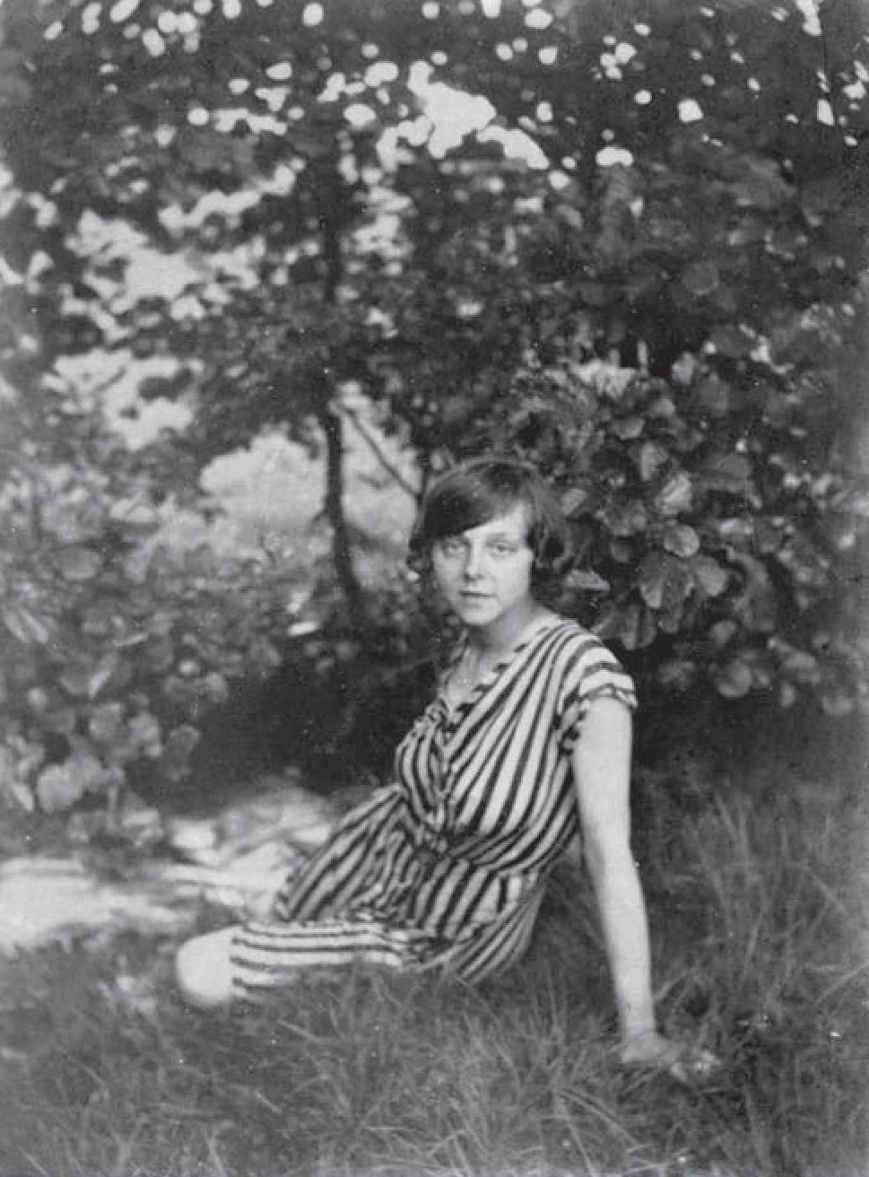 Božena Jelínková-Jirásková (1880-1951), česká malířka